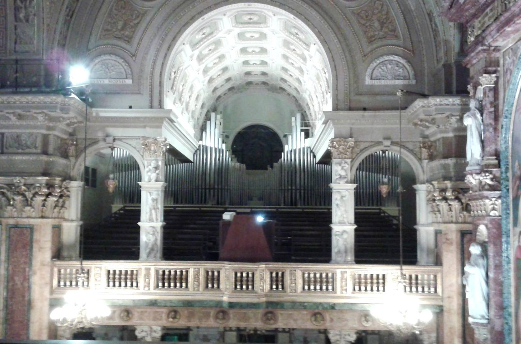 Santuario S.M.Ausiliatrice - Torino